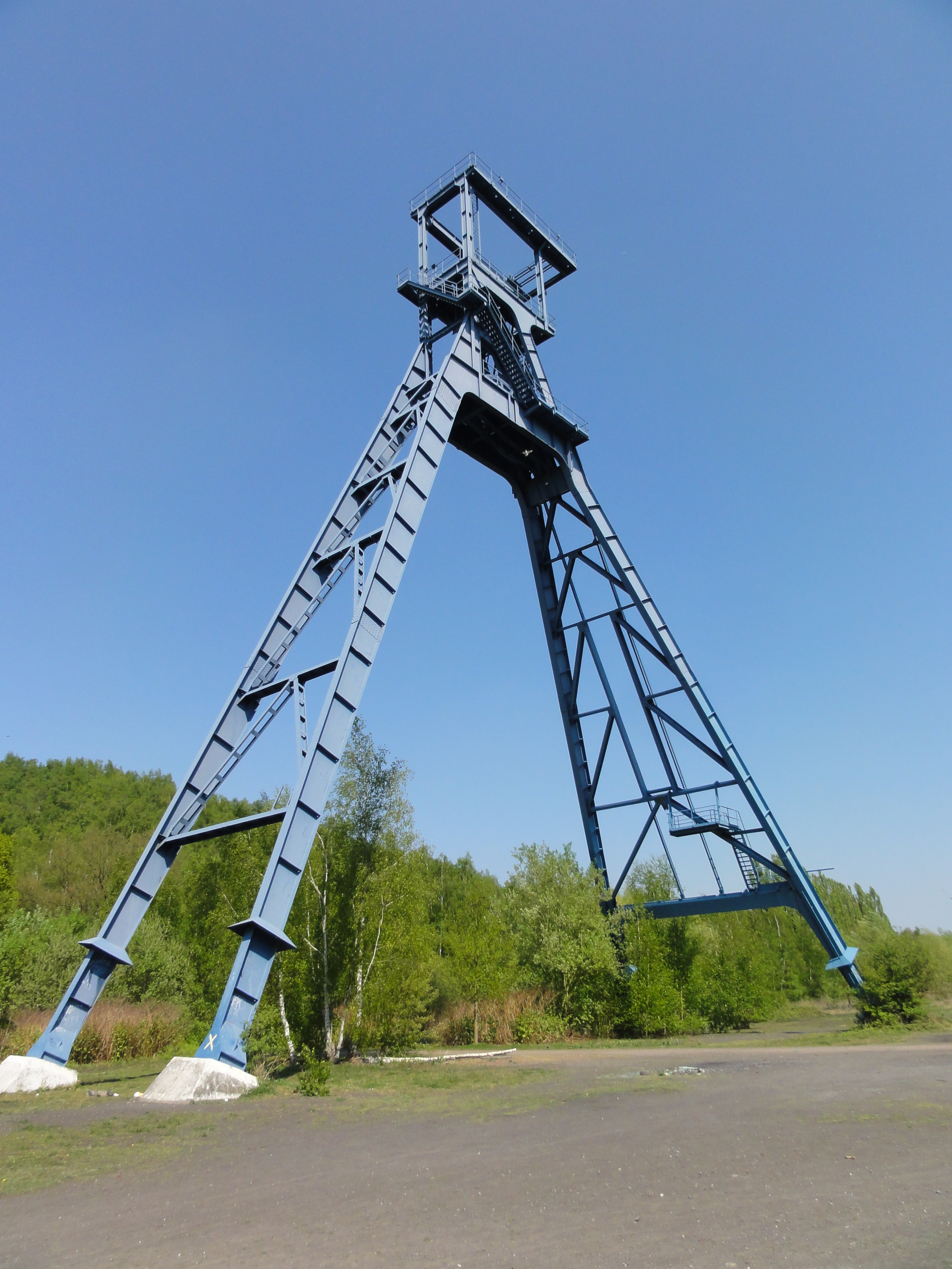 La fosse Sabatier de la Compagnie des mines d'Anzin était un charbonnage du bassin minier du Nord-Pas-de-Calais constitué de deux puits situé à Raismes, Nord, Nord-Pas-de-Calais, France. .